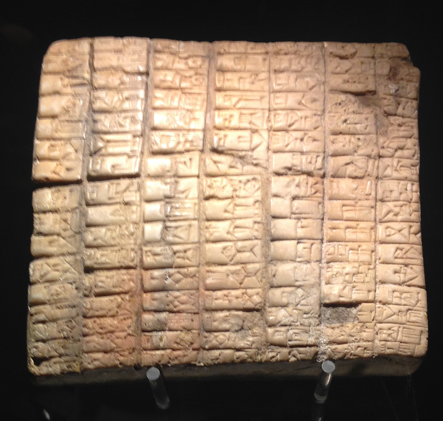 Proveniente dagli archivi del Palazzo Reale di Ebla